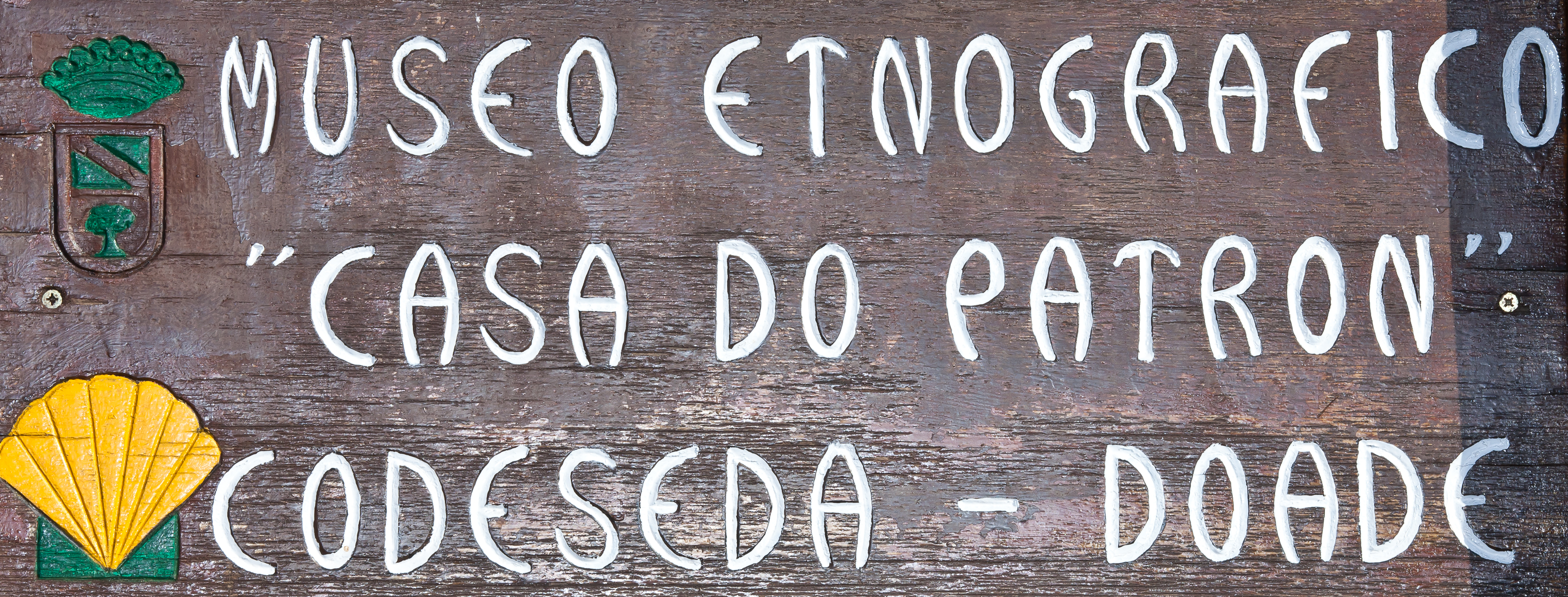 Casa do patrón, Doade, Lalín